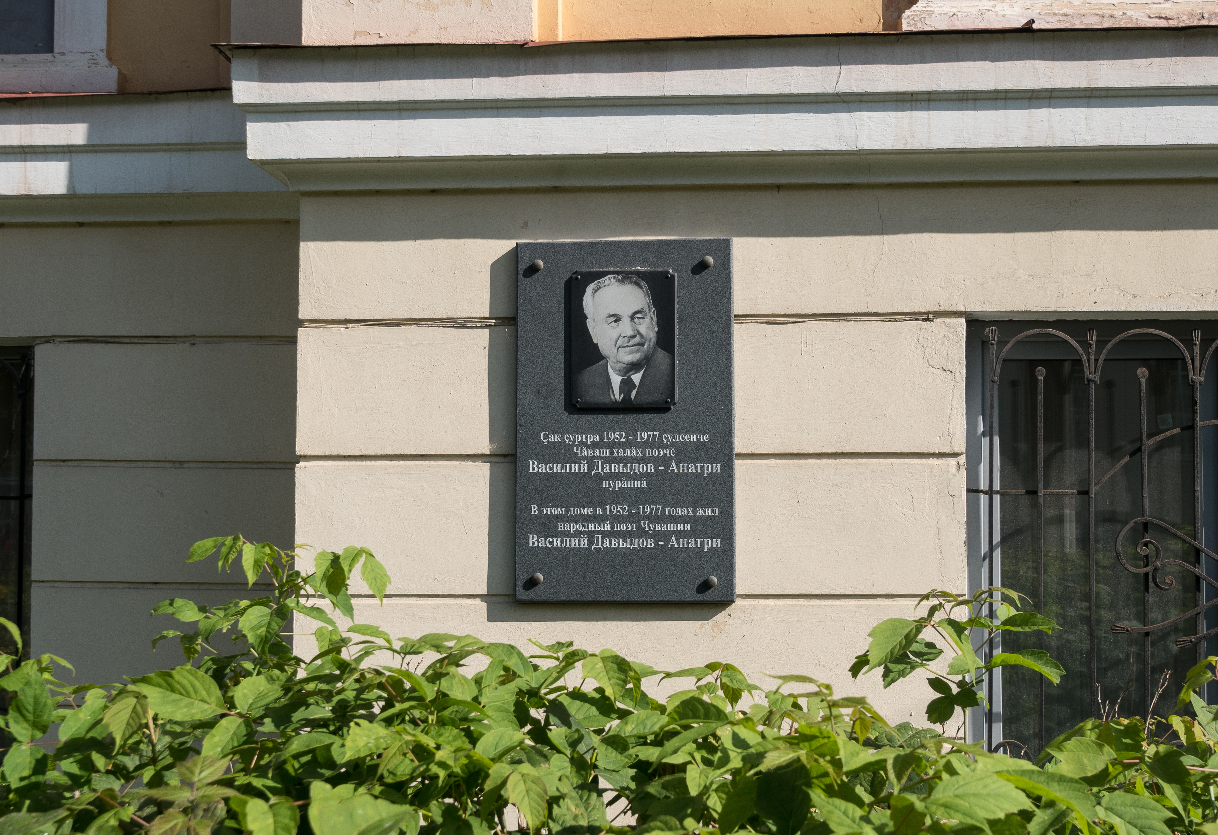 Мемориальная доска Василию Ивановичу Давыдову-Анатри на доме по ул.Карла Маркса, 33 в г. Чебоксары